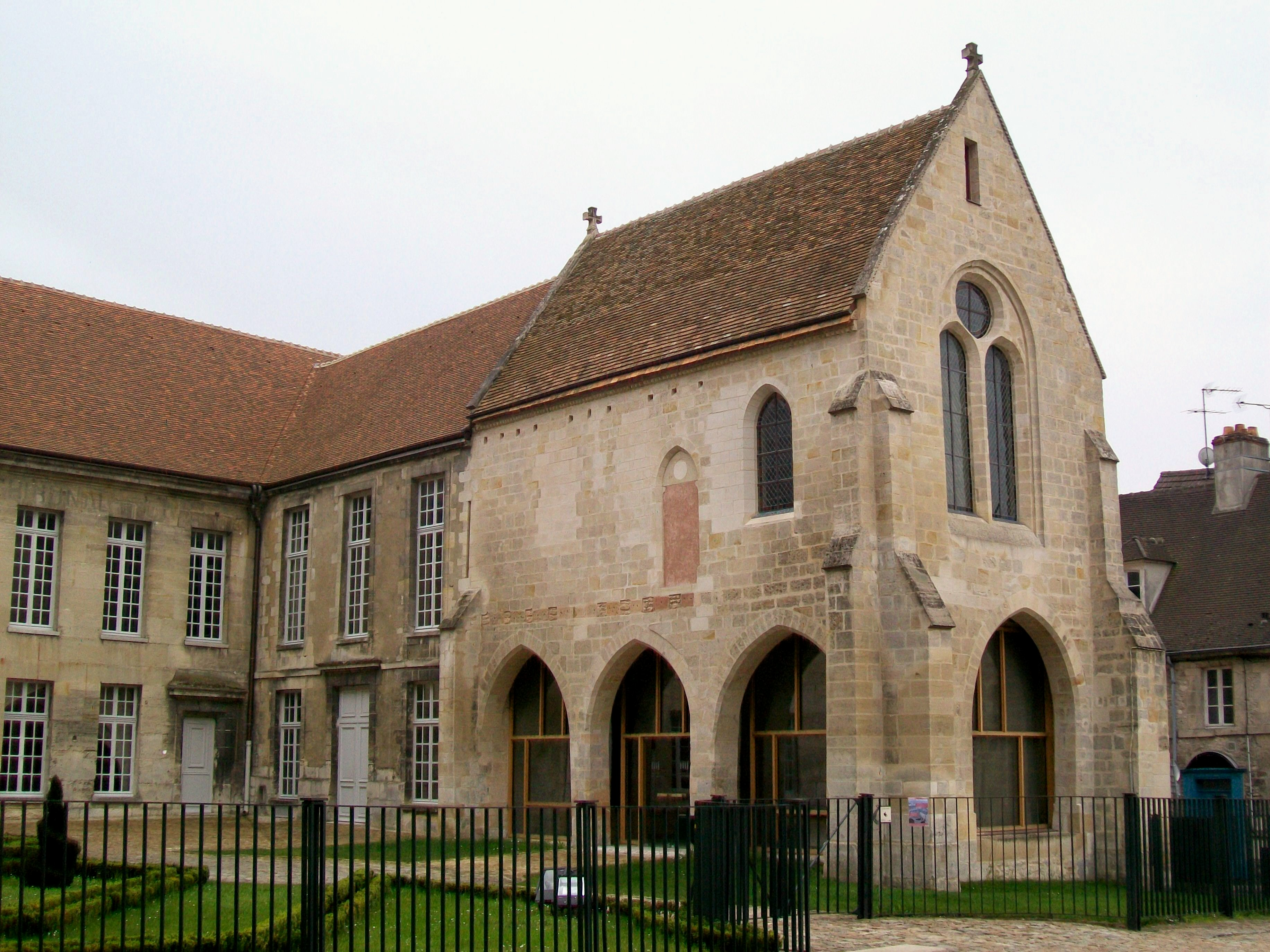 La chapelle de l'ancien évêché, donnant sur la place Notre-Dame. Ici se trouvait une cour intérieure avant la démolition de l'aile occidentale de l'évêché.